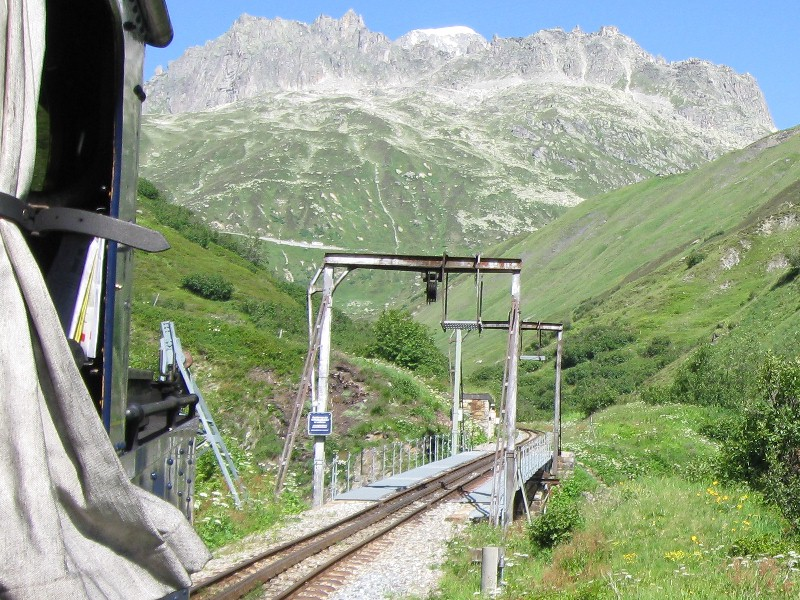 Steffenbachbrücke, gesehen von einem bergwärts fahrenden Zug Steffenbach bridge viewed from a train going uphill